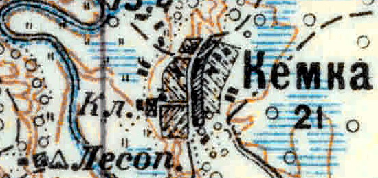 Топографическая карта Ленинградской области, квадрат VIc (Красные Горы), деревня Кемка